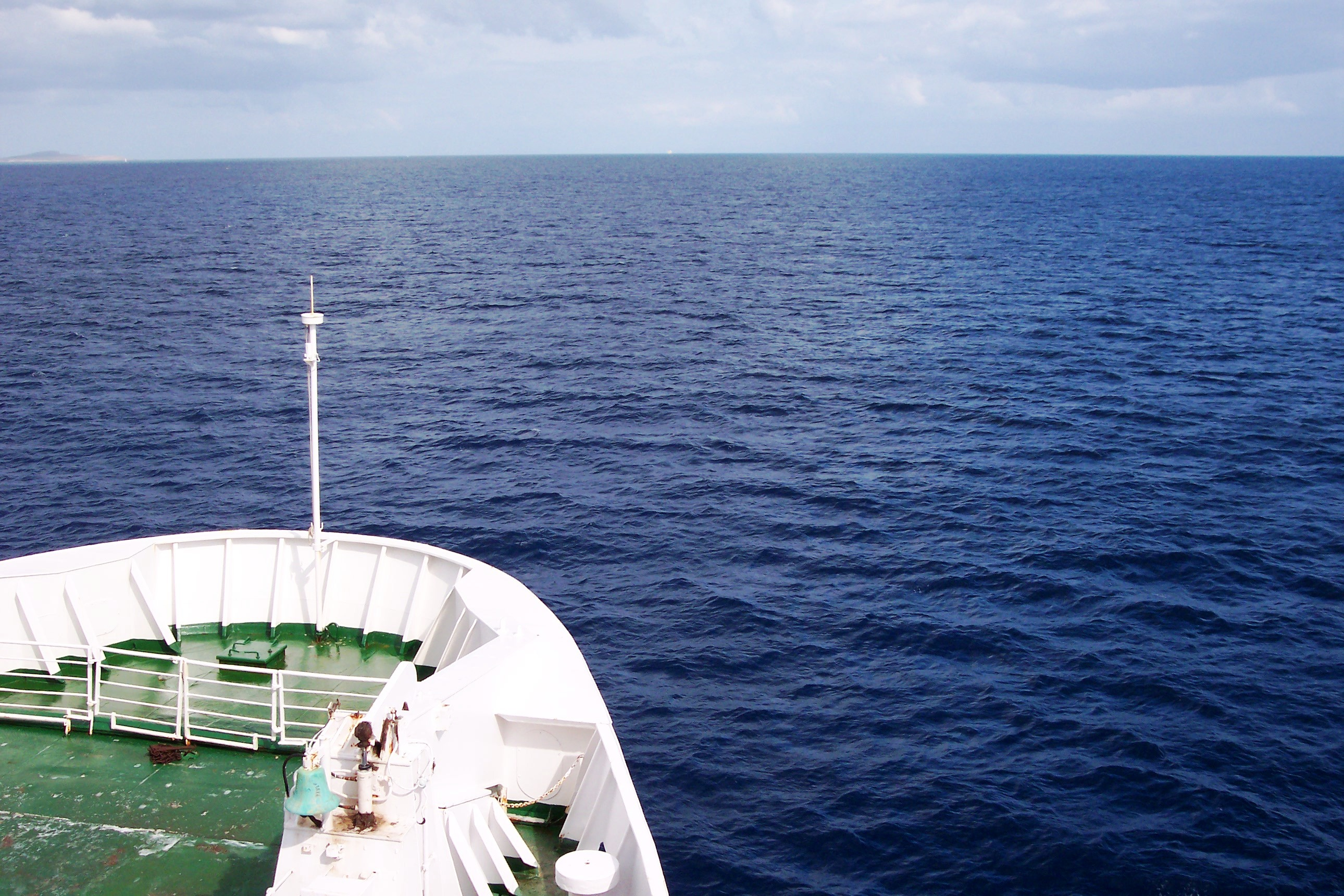 From Minorca to Barcelona